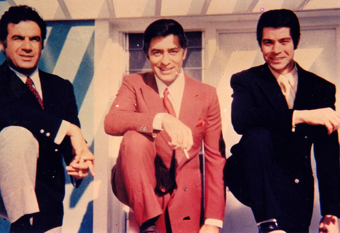 از چپ: ناصر ملک‌مطیعی، محمدعلی فردین و بهروز وثوقی تاریخ عکس: میانه دهه 1340 خورشیدی